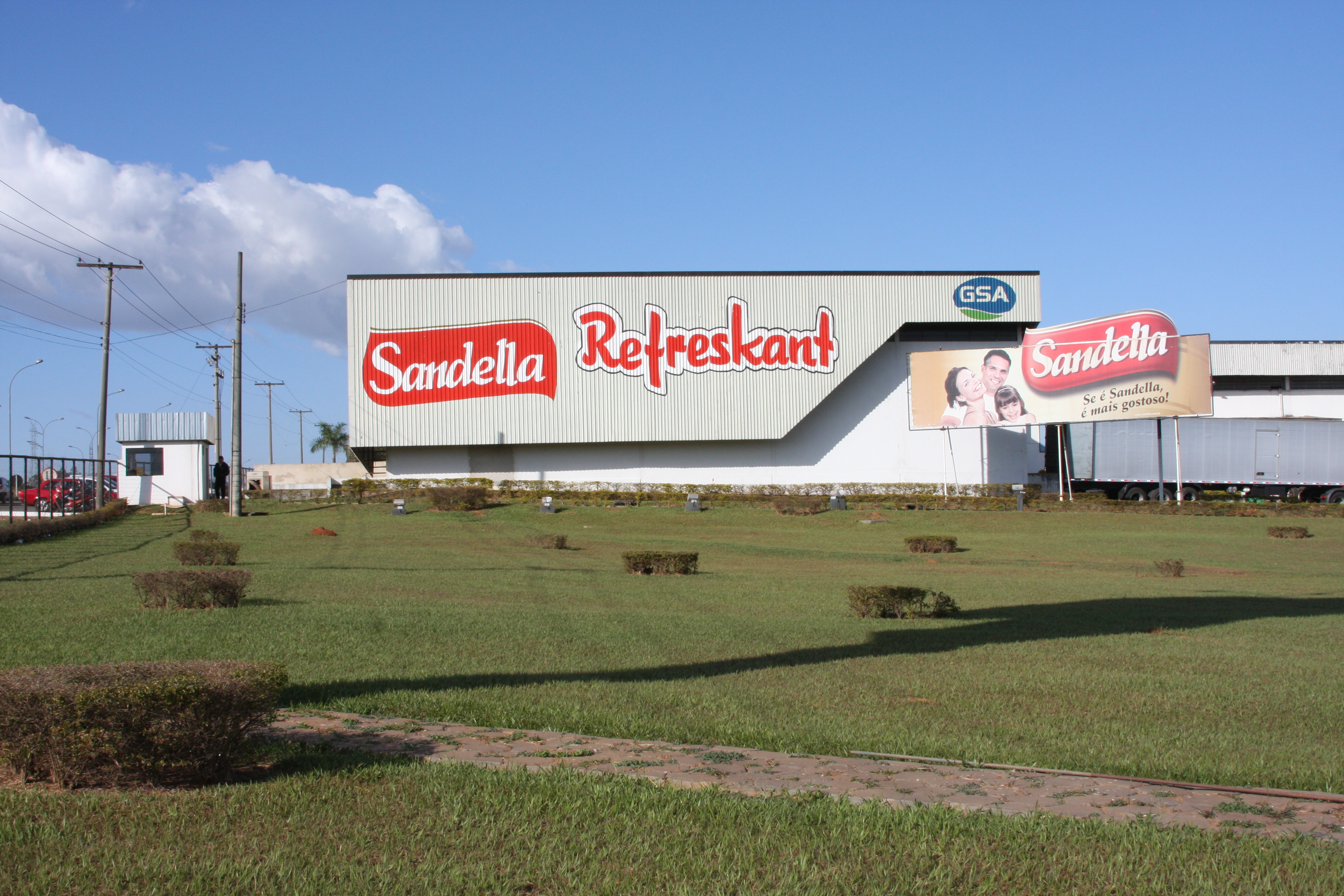 Fachada GSA 2008